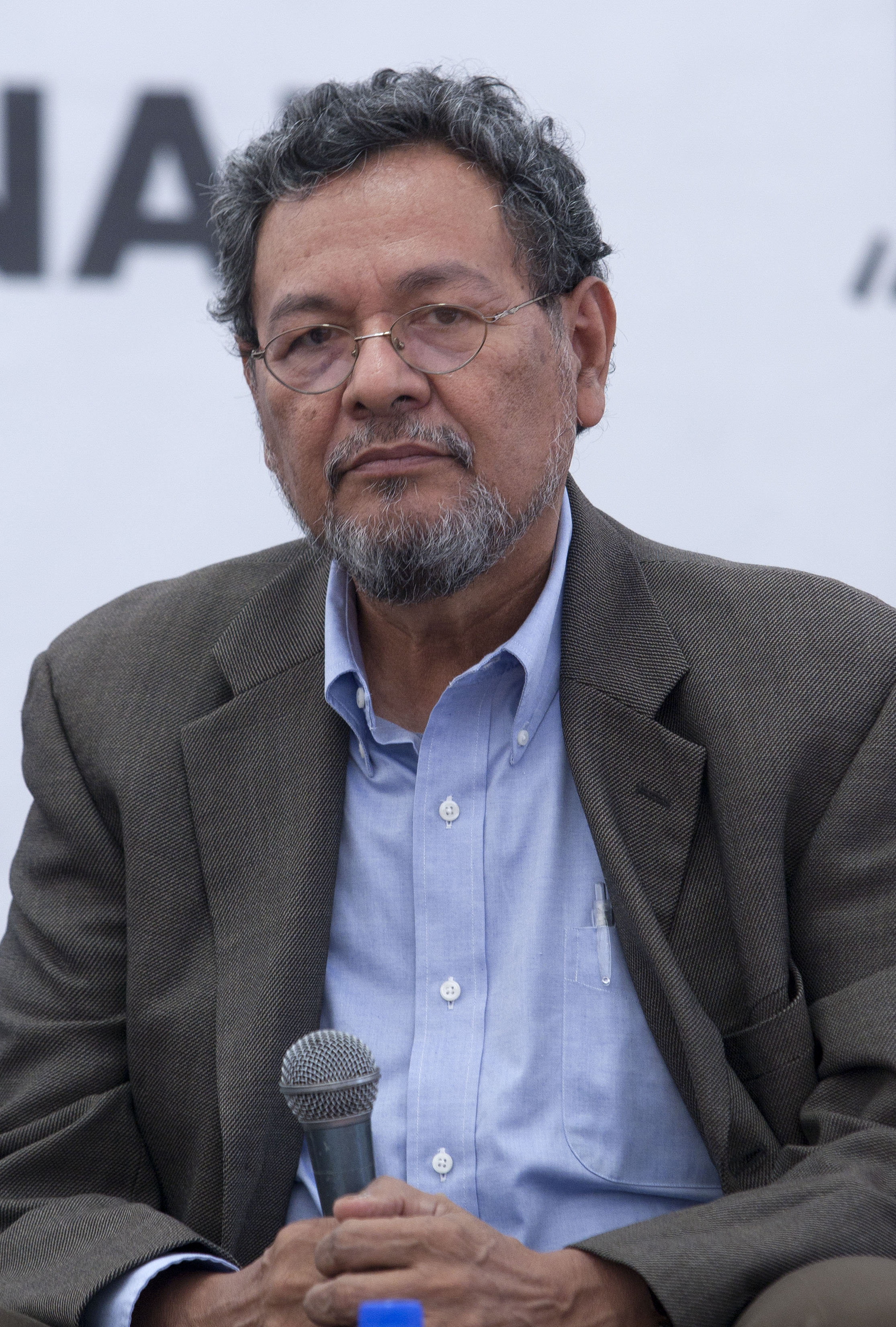 Viernes, 25 de Octubre 2013. Presentación del libro Tranca Palanca de Elmer Mendoza en la XIII Feria Internacional del Libro del Zócalo de la Ciudad de Mexico. Foto: Antonio Nava/Secretaria de Cultura